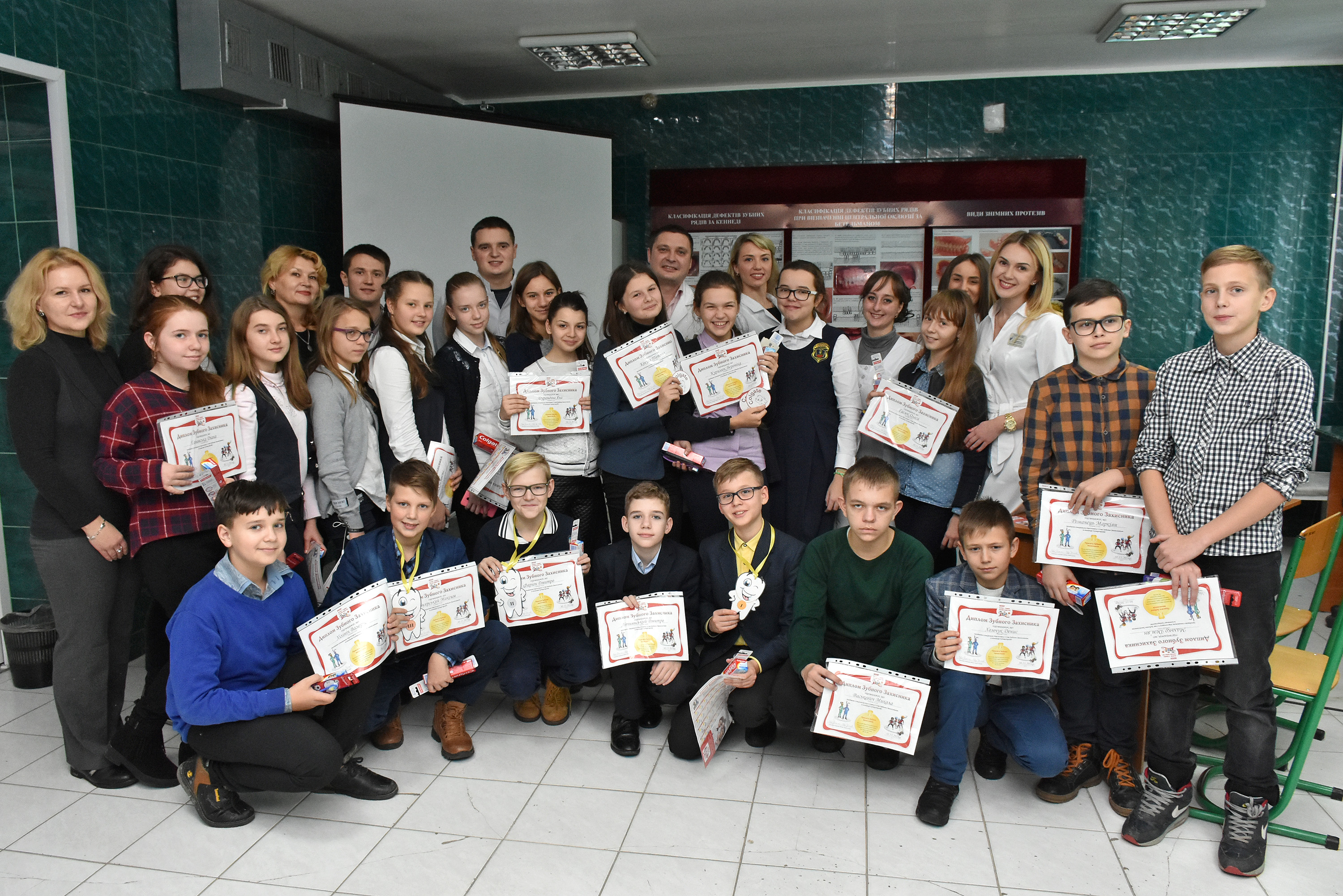 Майстер-клас гімназистам на кафедрі ортопедичної стоматології стоматологічного факультету ТДМУ. Учасники майстер-класу.